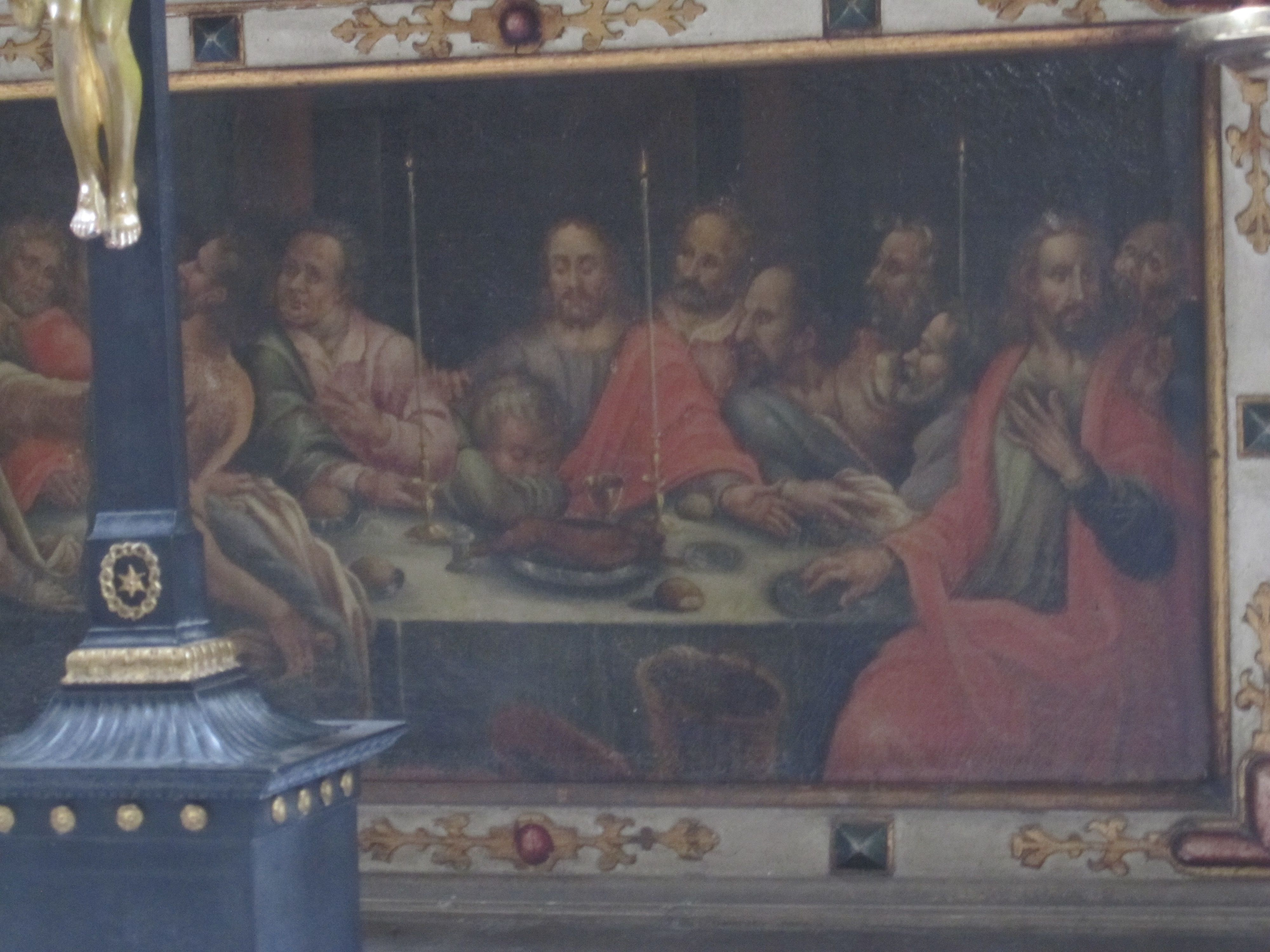 Abendmahlszene in der Predella des Altars der St. Nikolai-Kirche - ein Kind sitzt auf Jesu Schoß, links und rechts die zwölf Jünger.